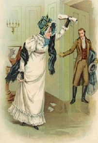 ホワイトハウス炎上前に貴重な州の文書を持ち出すドリー・マディソンを描いた19世紀末のイラスト